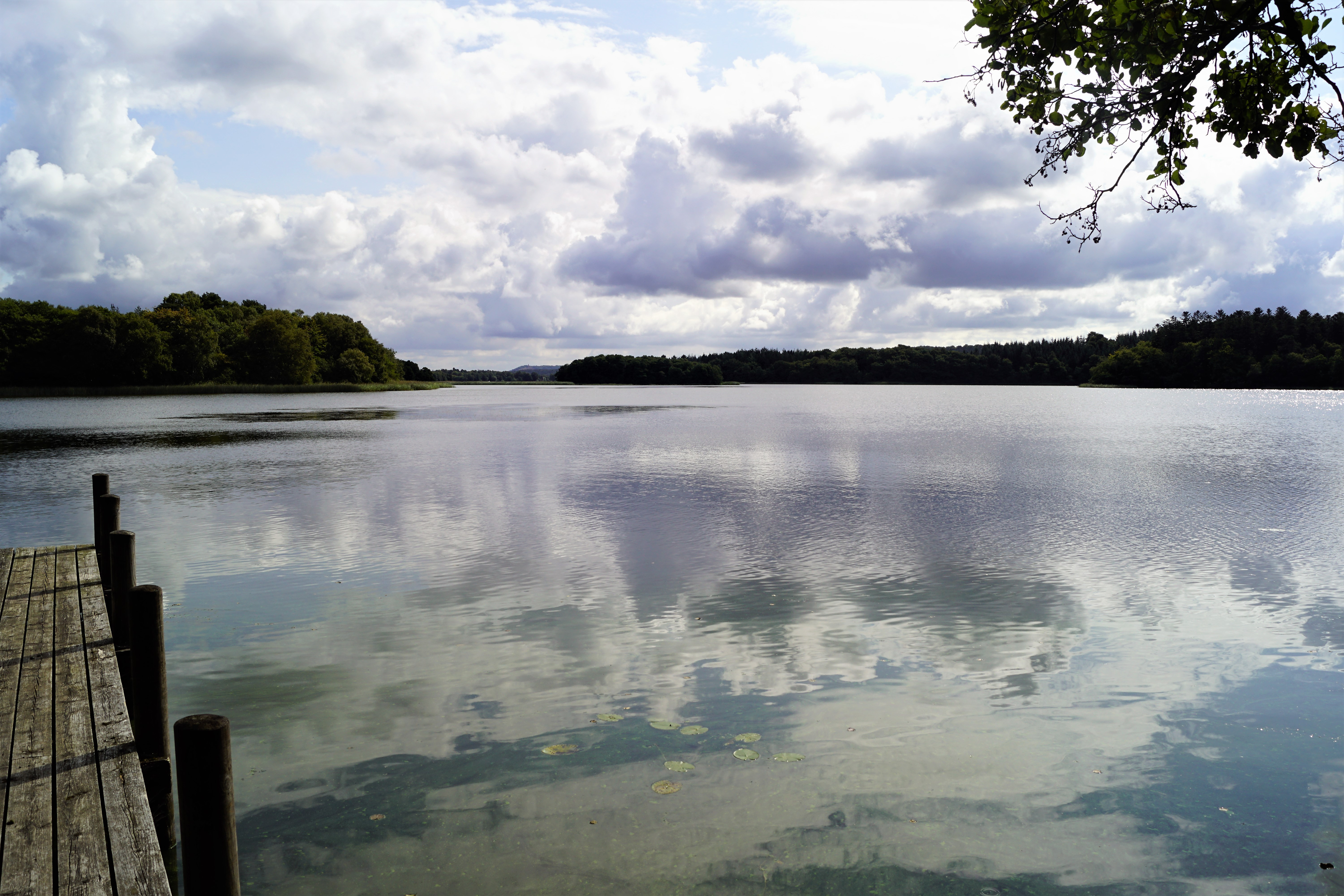 Brassø set mod NØ fra Kongsdyb